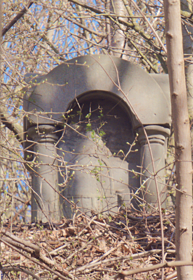 Der Busse-Stein stand von 1938 bis 1995 im Bürgerholz am Weg von Ihme (Stadt Ronnenberg) nach Ohlendorf (Hemmingen). Er erinnert an den am 5. Mai 1842 im Empelder Holz erschossenen Jäger Wilhelm Busse. Der Stein musste 1936 der Kalihalde Empelde weichen. Seit 1995 steht der Stein wieder auf einem Plateau im Südwesten der Halde. Der Standort auf Privatgrund ist nur selten zugänglich.